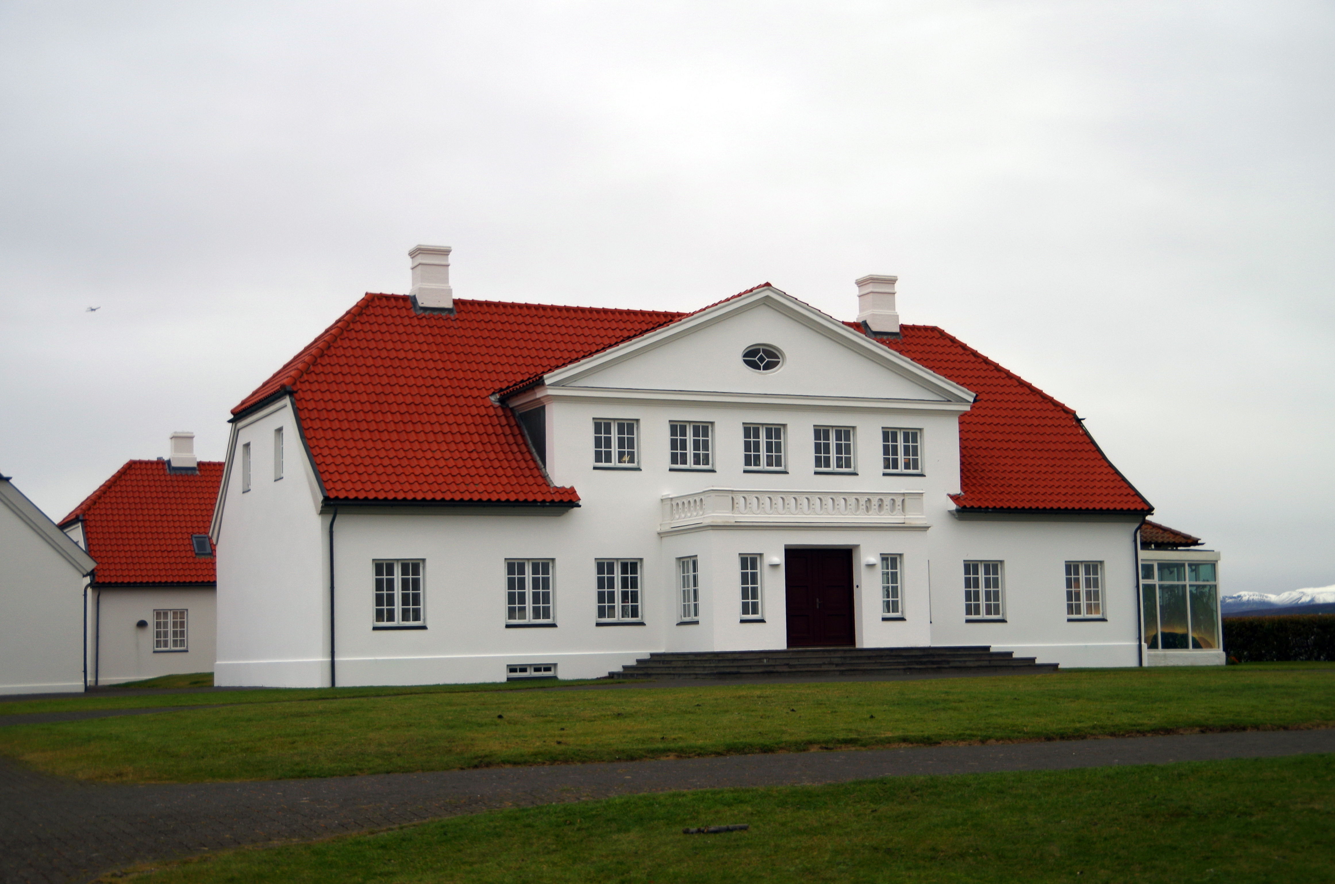 Bessastaðir, Wohnsitz der isl. Präsidenten